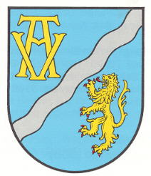 Wappen von Oberalben